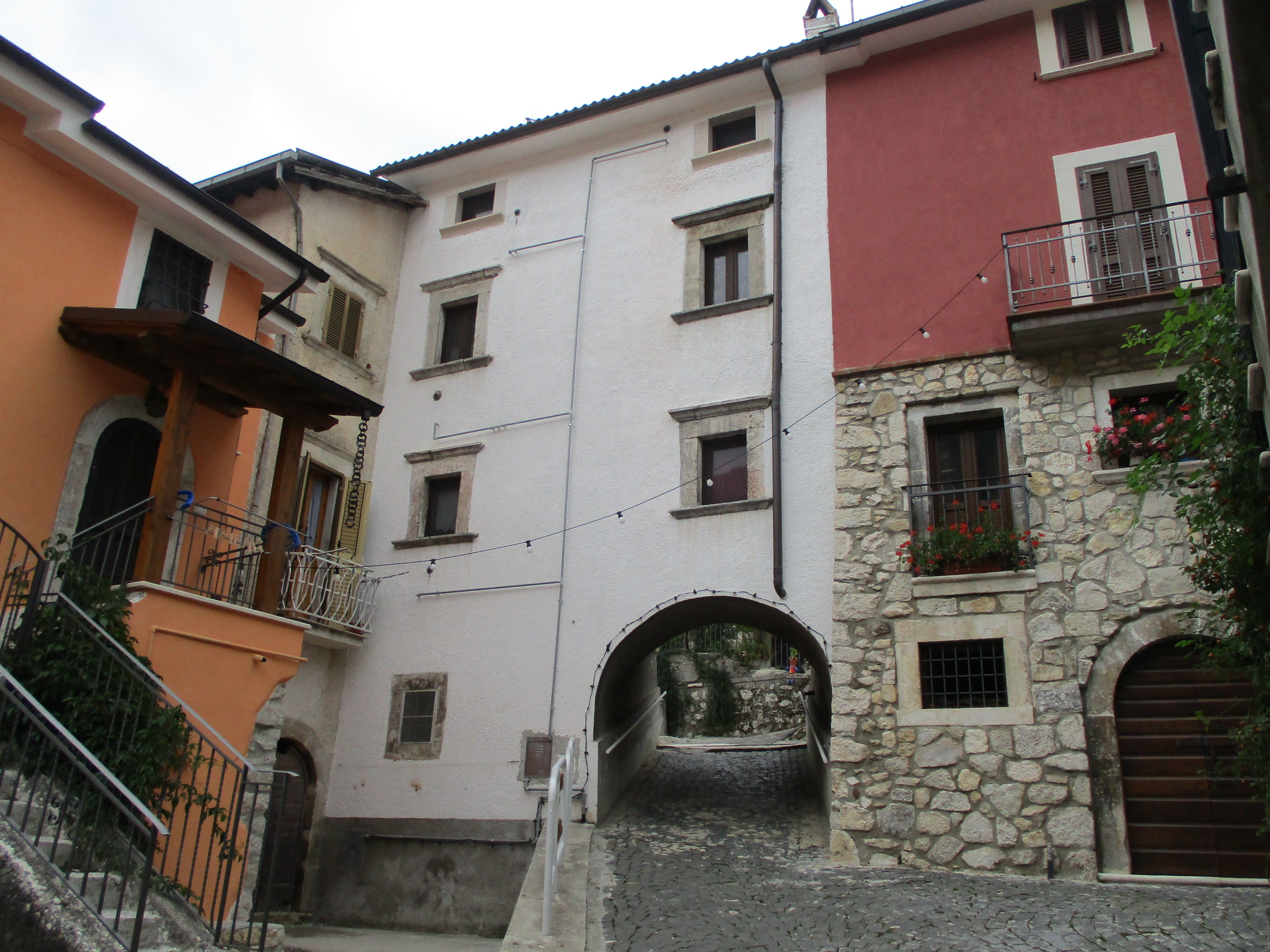 Scorcio del borgo